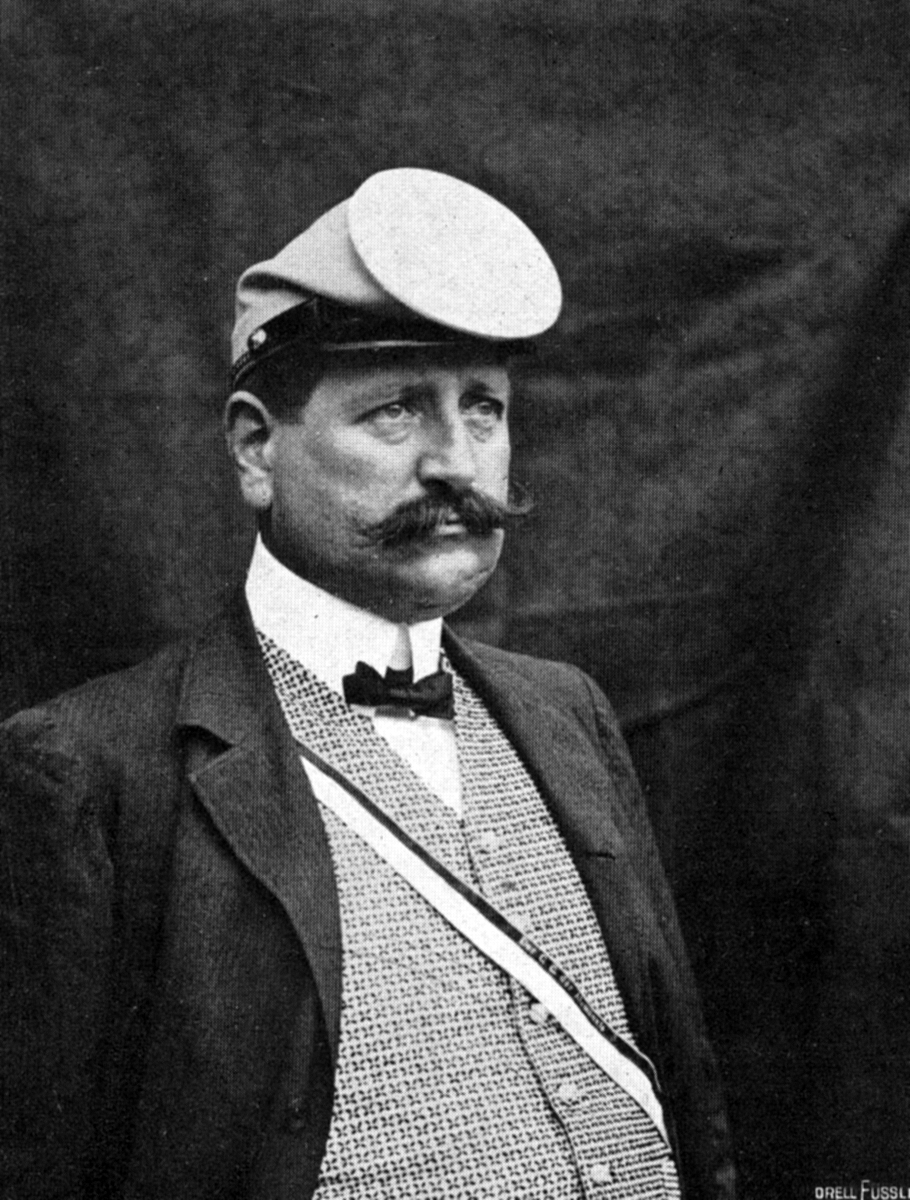 Hermann Blattner (1866–1910), Schweizer Germanist, Apotheker, Journalist und Autor.